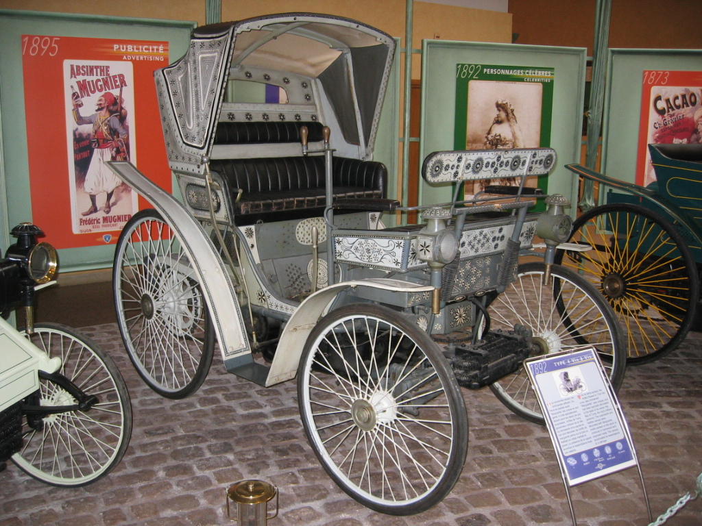 Peugeot Type 4 de 1892 - Musée Peugeot Sochaux